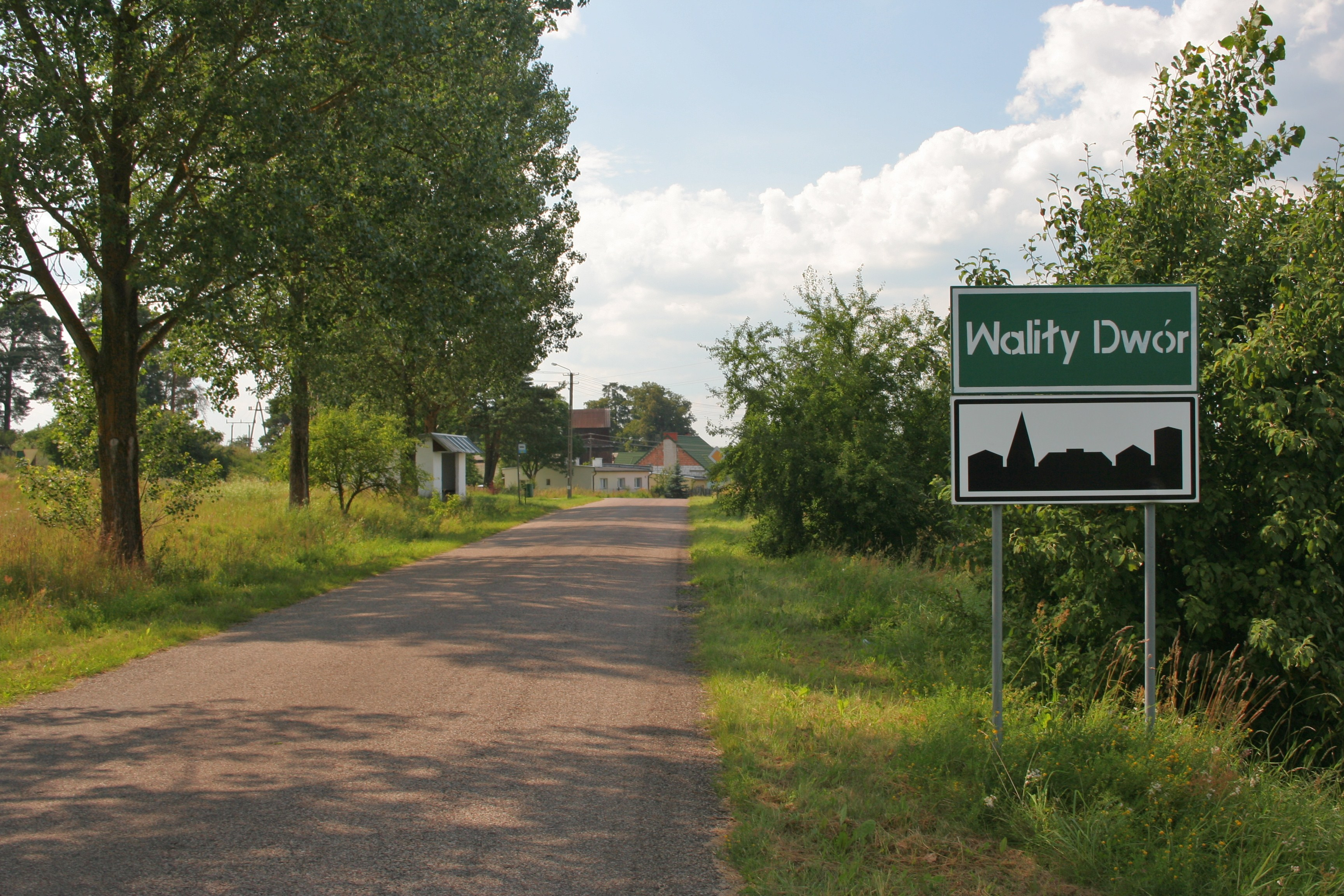 Droga wjazdowa do wsi Waliły-Dwór.